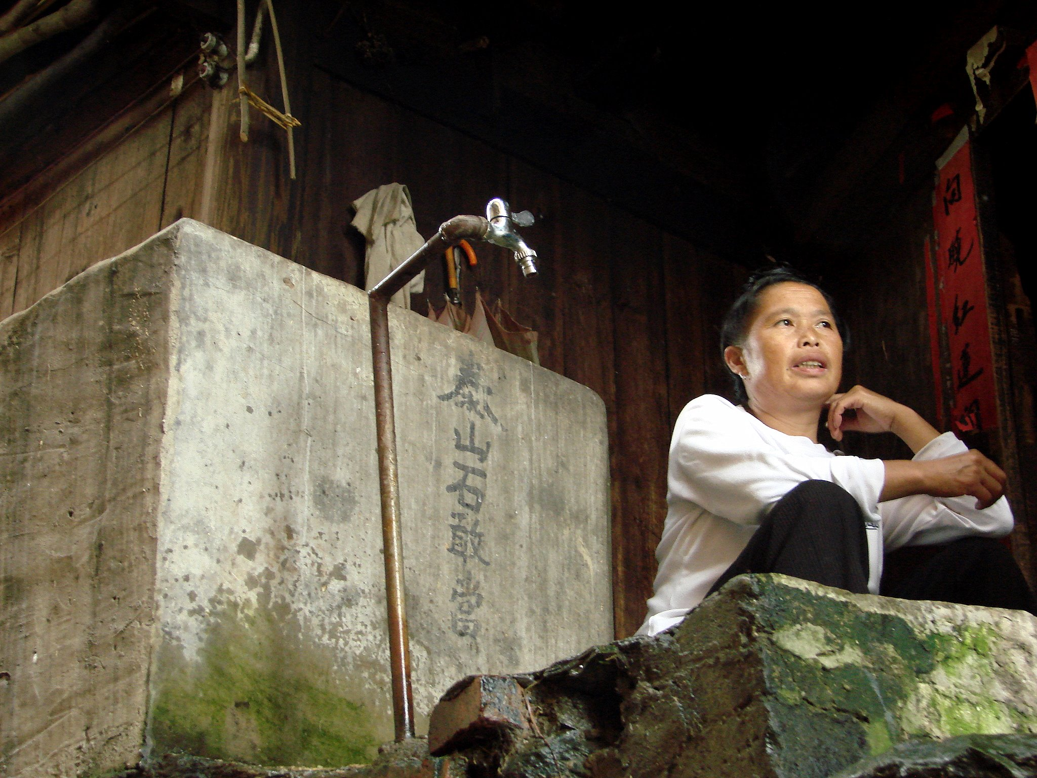 贵州黔东南州堂安侗寨泰山石敢当